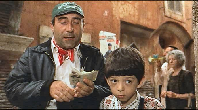 Screenshot del film Trastevere (1971) di Fausto Tozzi